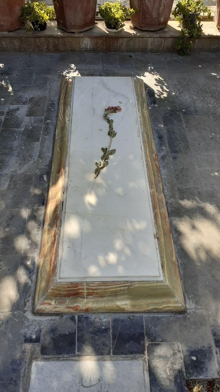 مزار میر ابوالفضل عنقای طالقانی که در گورستان ابن بابویه شهرری واقع شده است. مزار وی بدون هیچگونه نوشته و علامتی است که در نوع خود عجیب است.